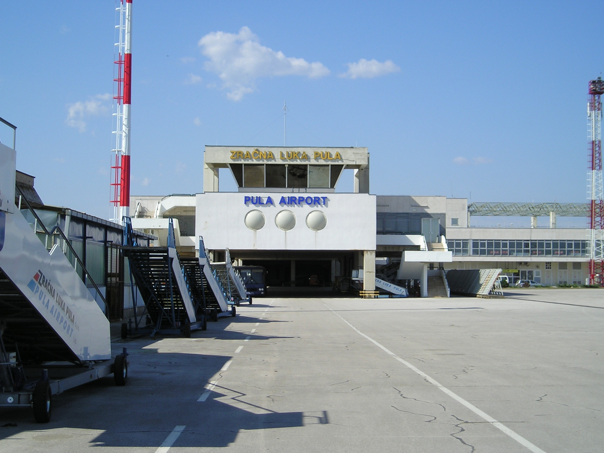 Airport Pula, Croatia